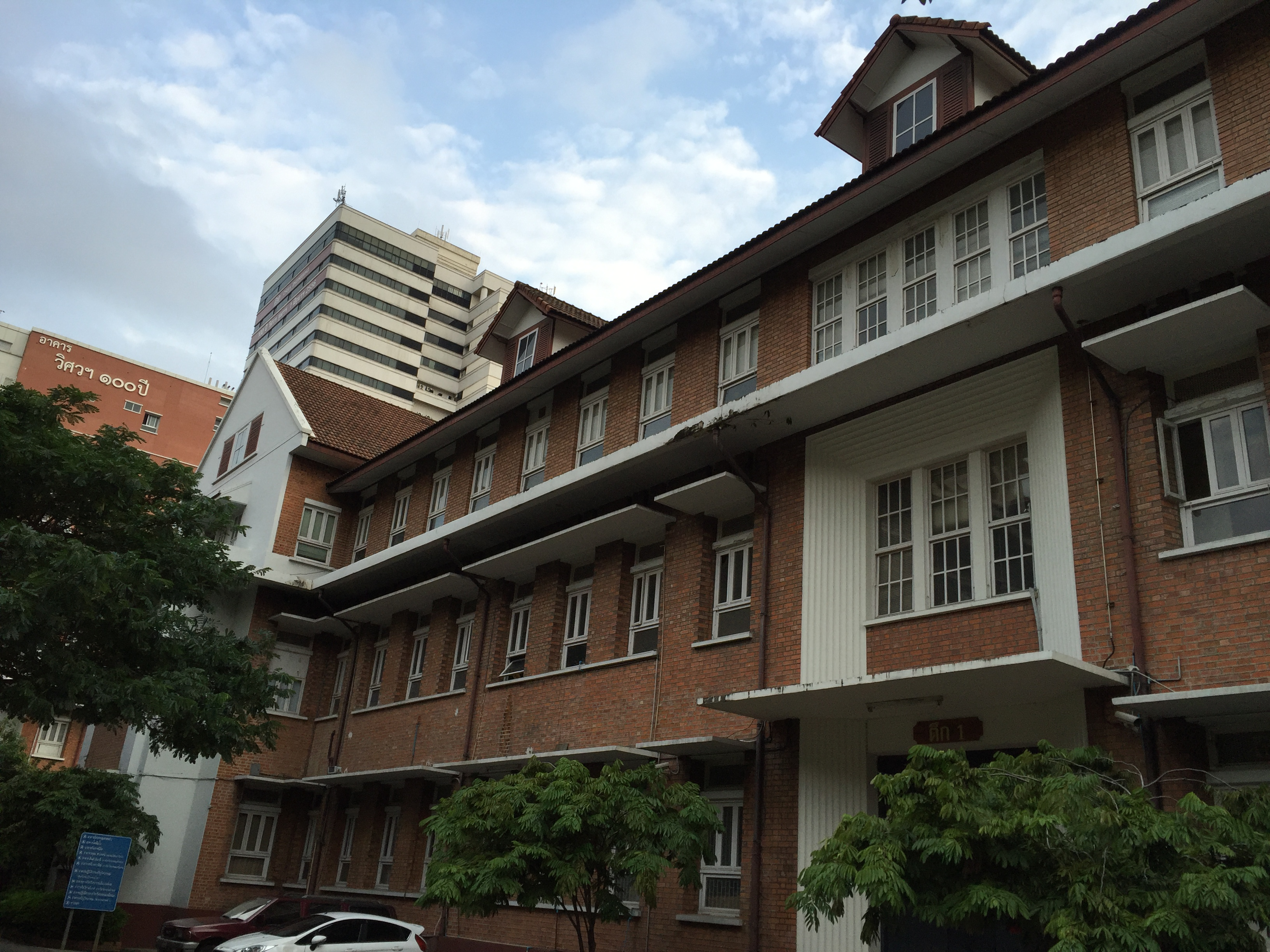 อาคาร 1 คณะวิศวกรรมศาสตร์ จุฬาลงกรณ์มหาวิทยาลัย